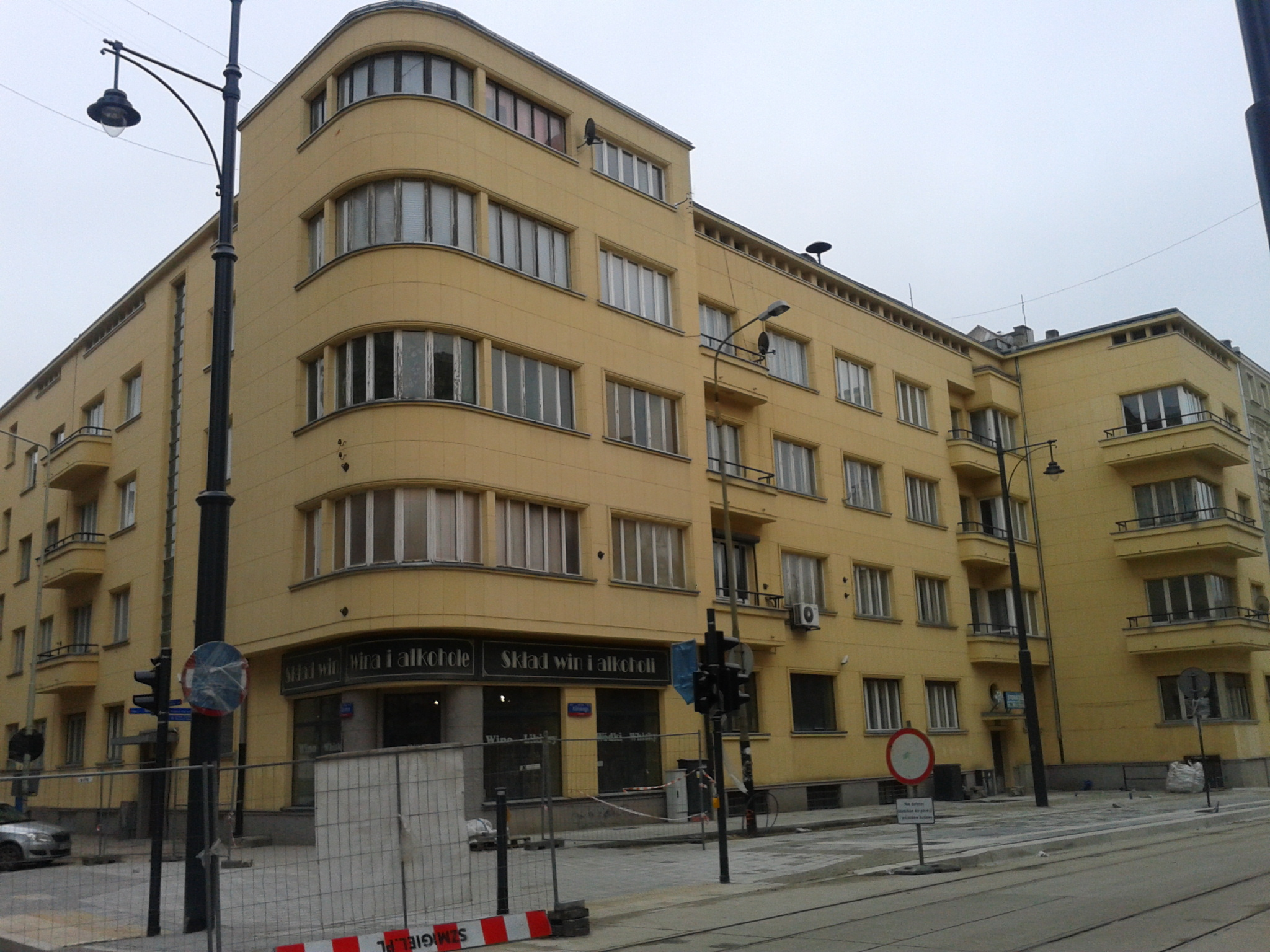 Łódź, modernistyczna kamienica u zbiegu ulic J. Kilińskiego (nr 82) i J. Tuwima (nr 21).